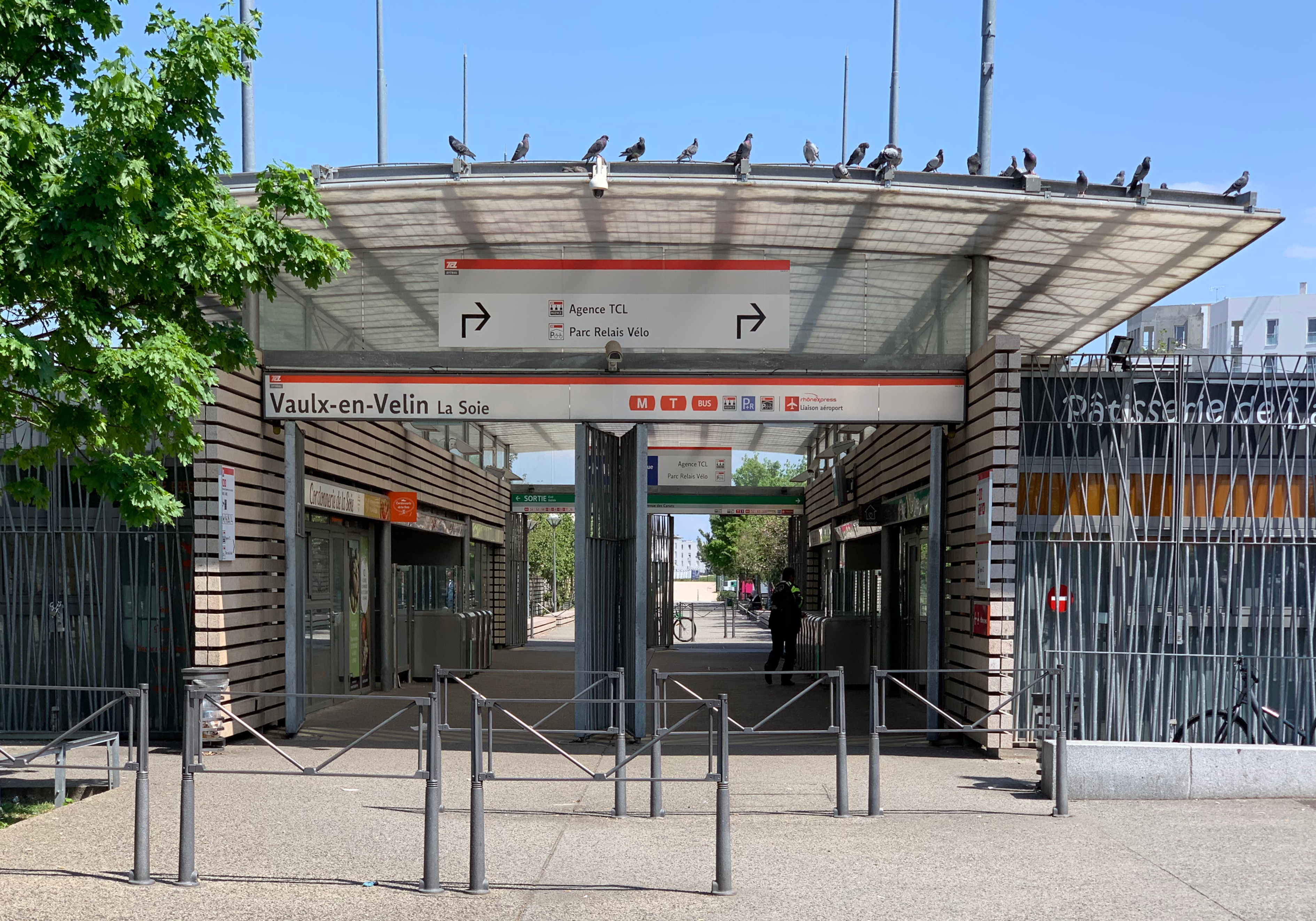 Vaulx-en-Velin - La Soie (Lyon Metro), avril 2019.